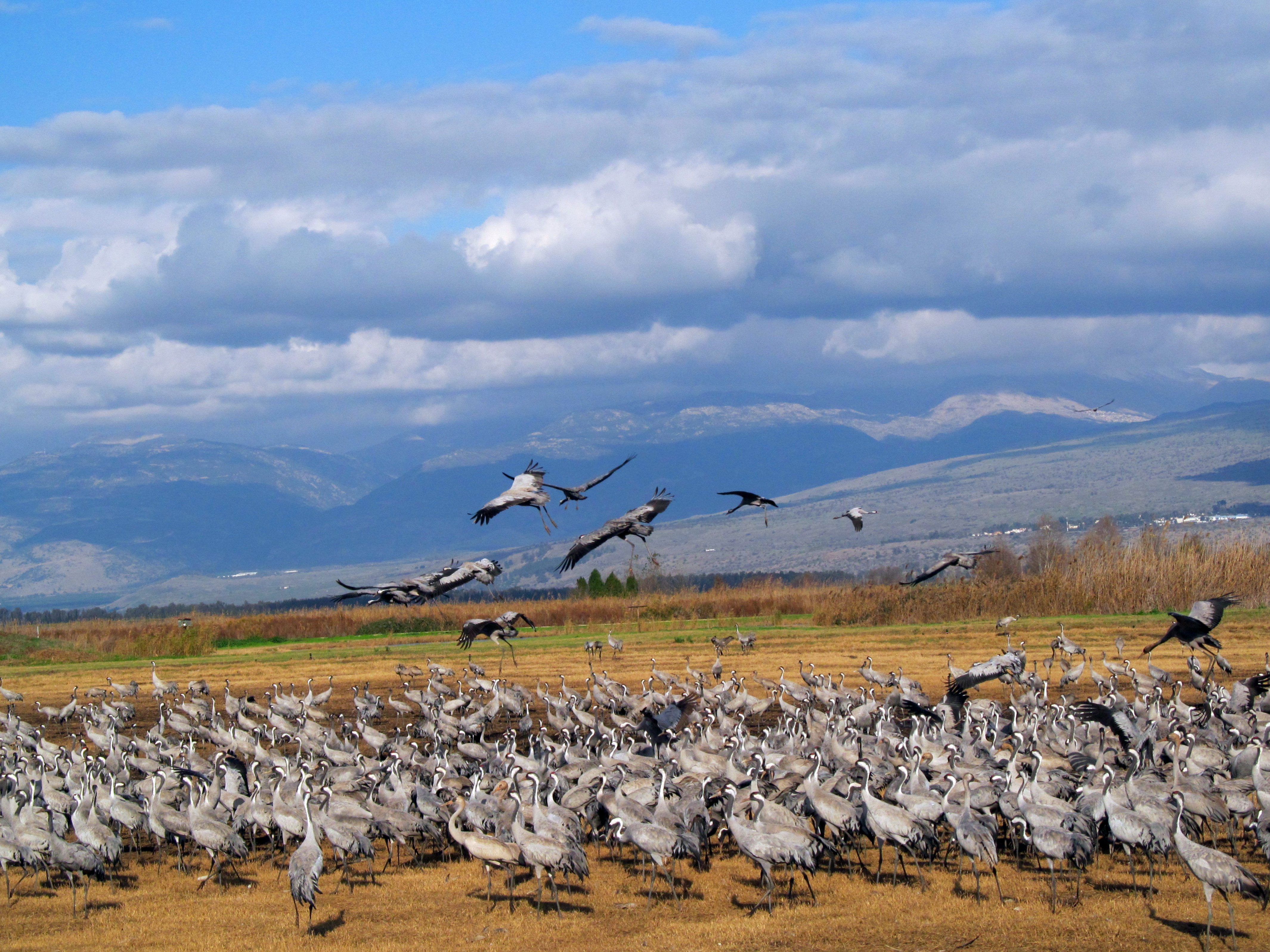 עגור אפור, אגמון החולה